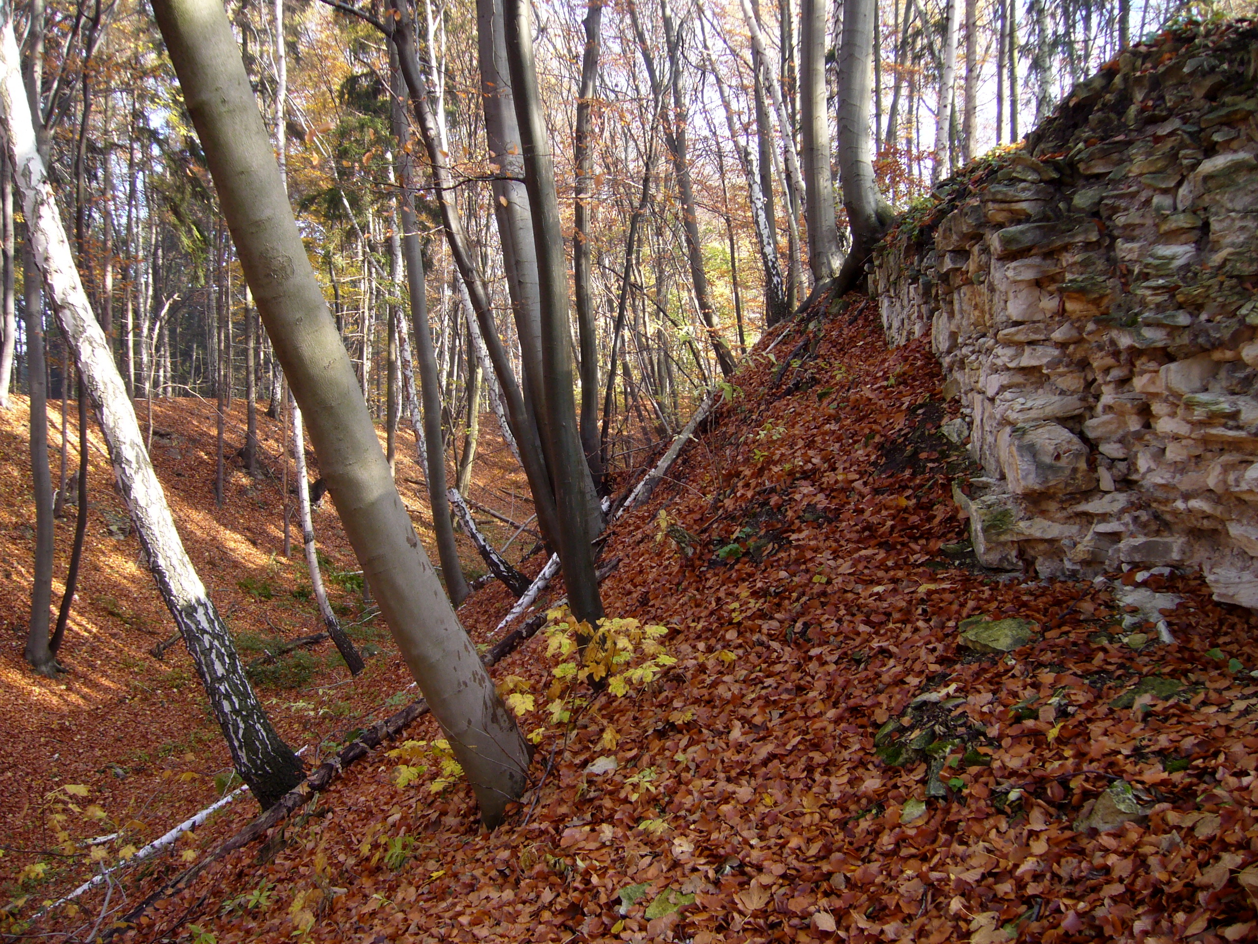 Příkop na severní straně hradu, hrad Džbán, jihozápadně od Lhoty, k. ú. Mutějovice a k. ú. Lhota pod Džbánem, Mutějovice.